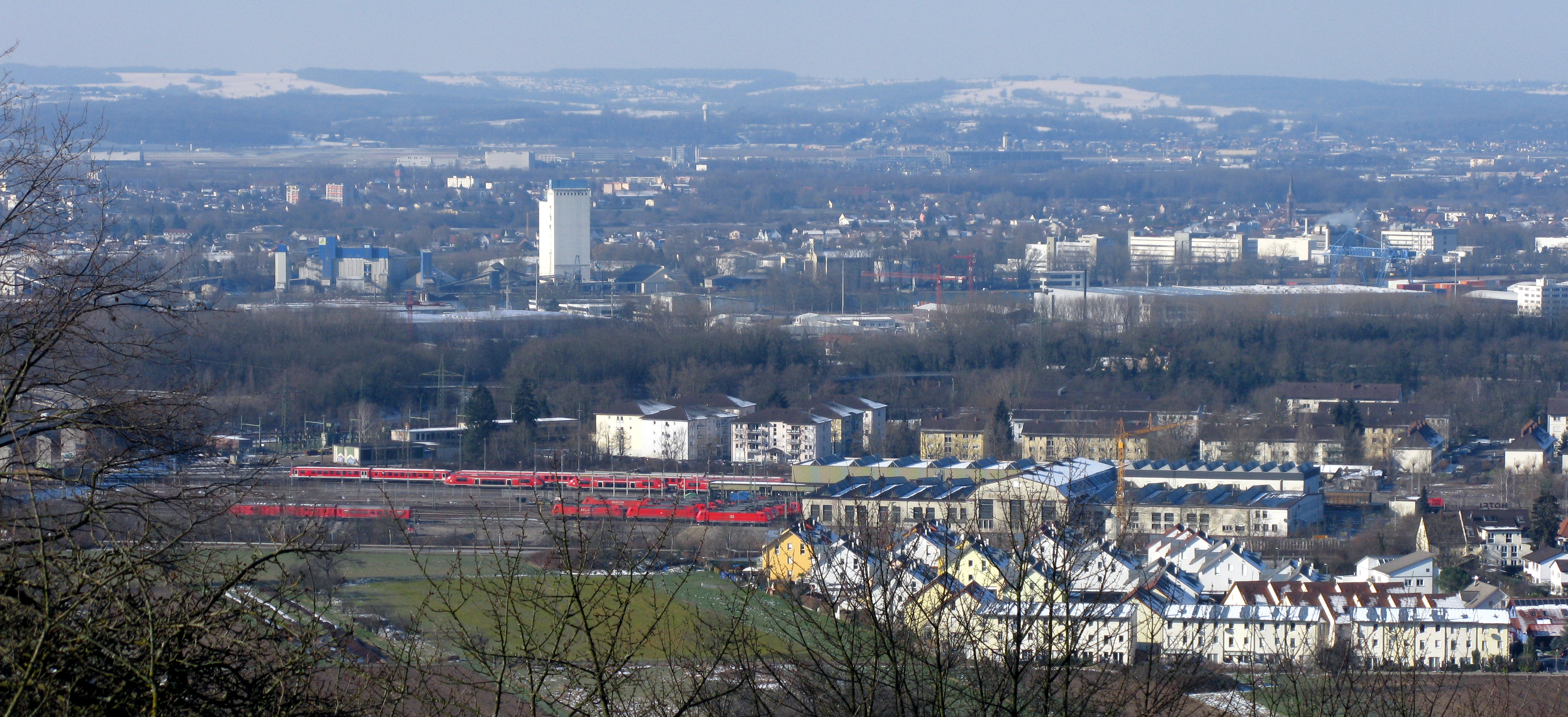 Blick auf das Bahnbetriebswerk Haltingen in Weil am Rhein